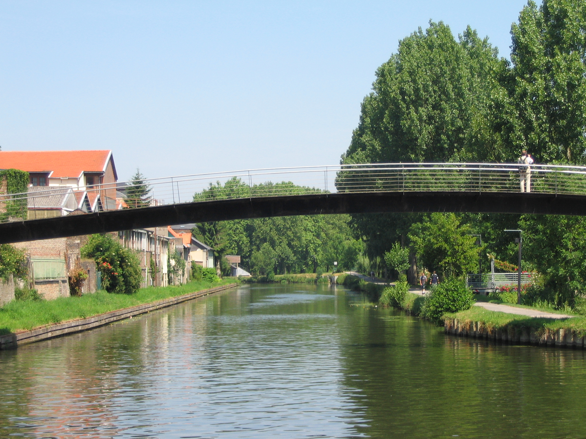 Passage vers le parc de Beauvillé, Amiens, Somme.